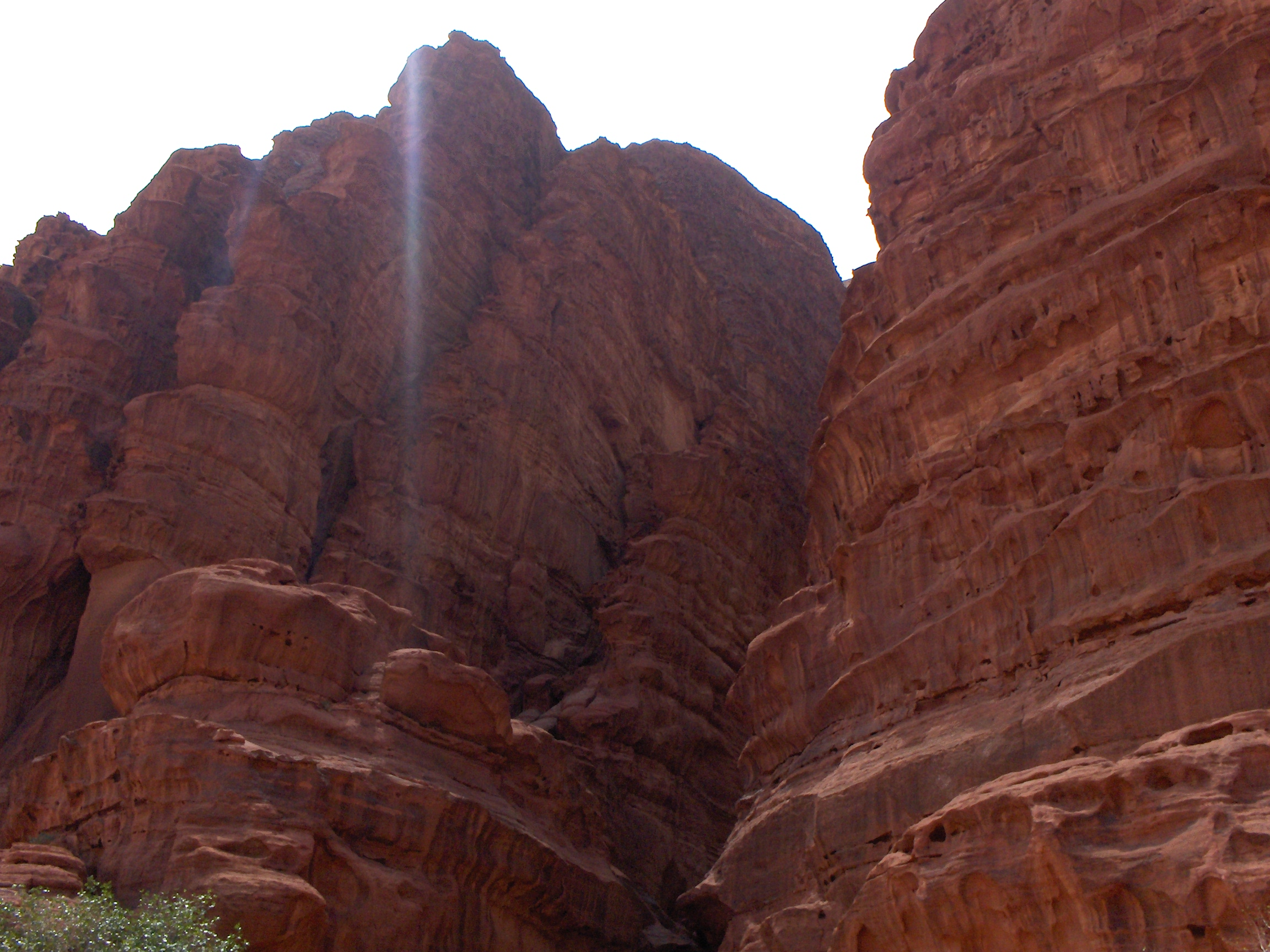 Rocce nel Wadi Rum